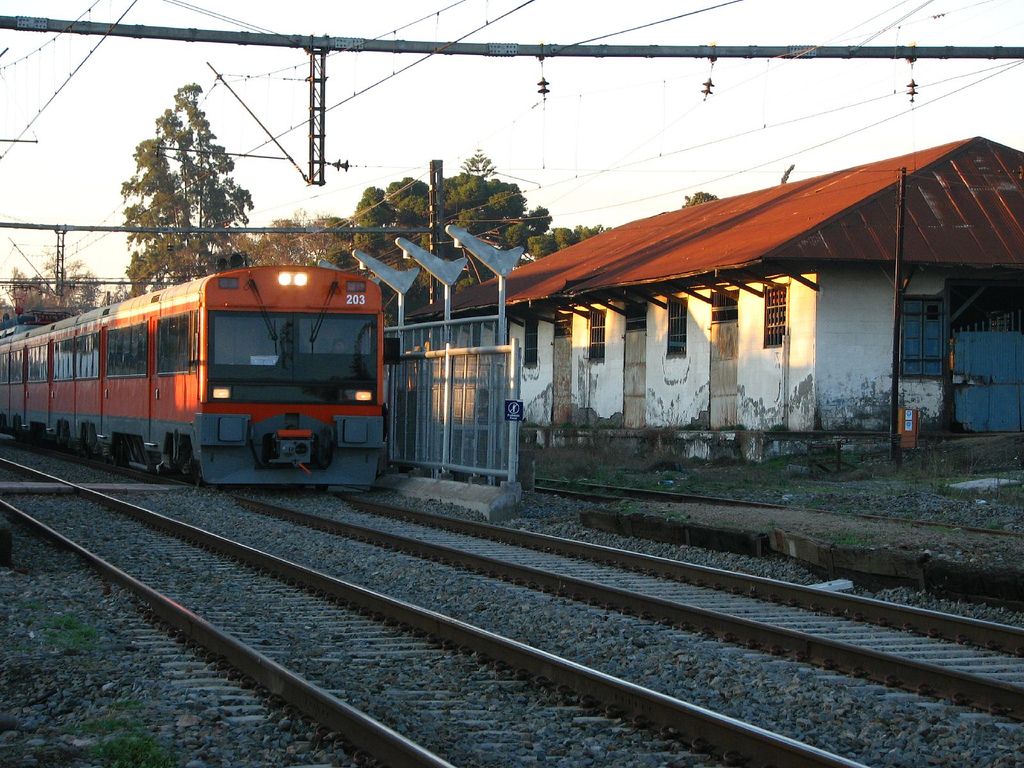 Metrotren y antiguas bodegas de la estación